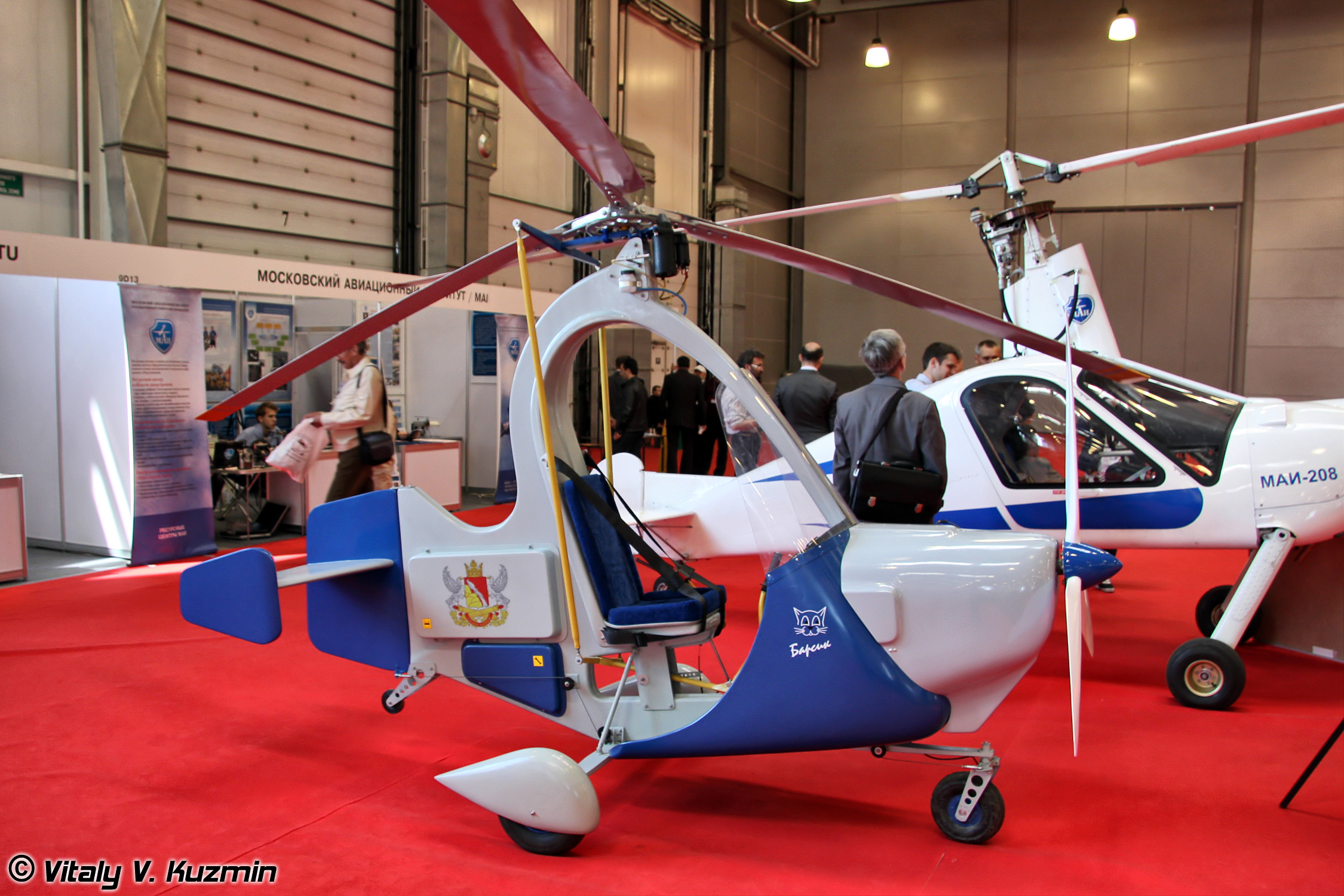 Сверхлегких одноместный автожир Барсик (Light autogyro Barsik)